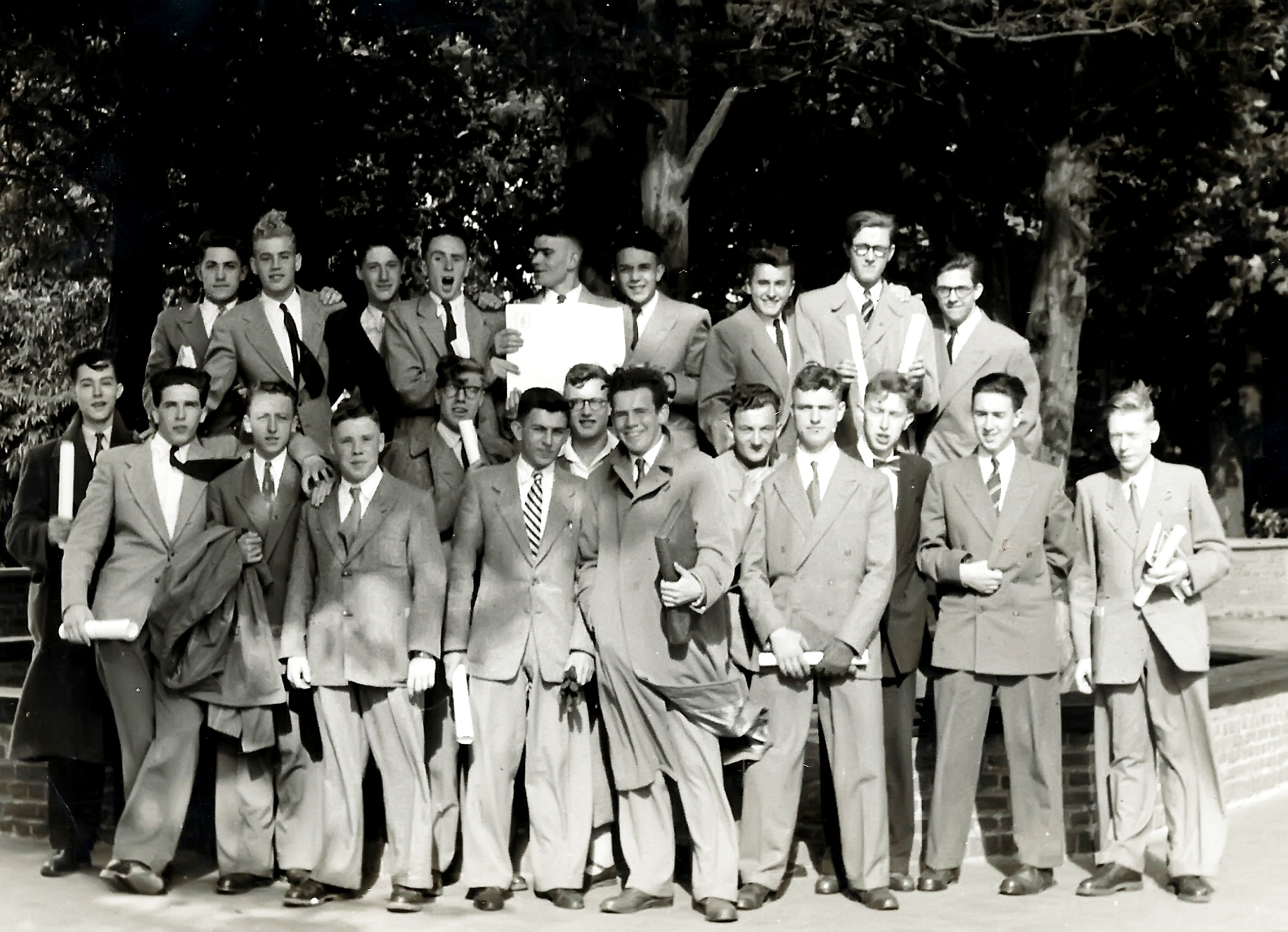 Na de proclamatie van de uitslagen wordt nog een laatste foto genomen op de speelplaats van het Heilig-Hartcollege. Van LNR. 1e rij: Dirk Bossier, Marcel Leys, Jozef Janssens, Raoul De Wolf, Harry Sneiders, Frans (Sus) Jacobs, Paul Hanssens, Pierre Vandervoorde, Peter Schutz, Guillaume(Willy) Speltincx, Pierre Verwilghen, Pierre Smeyers en André De Strycker. Achteraan: Willy Verhelst, Alfons Versteven, Jaak Vanhecke, Hugo Weckx, Jan Larivière, Frits Reygaerts, Willy Proot, André Haelvoet en Hendrik Ingels.